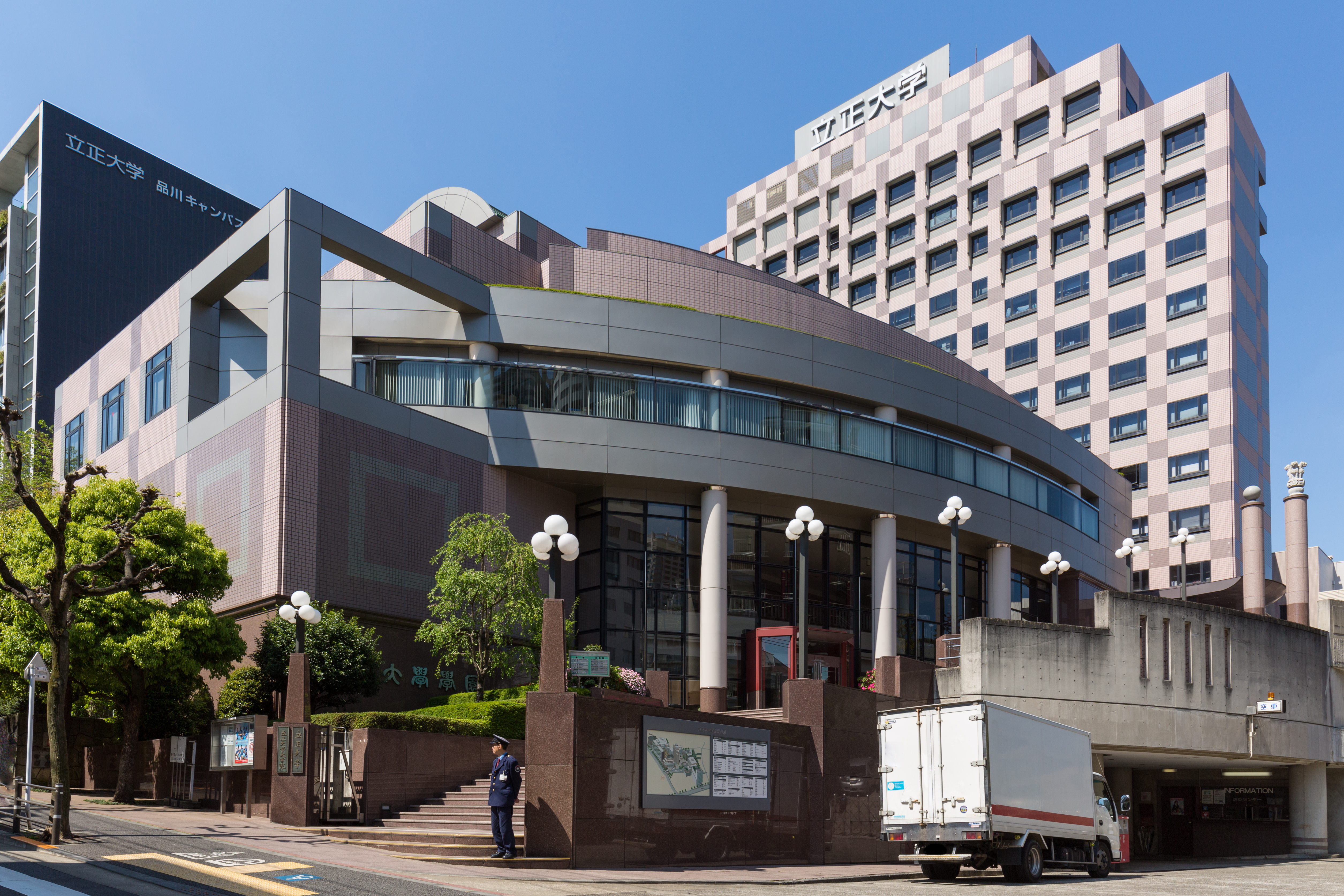 立正大学 品川キャンパス 正門